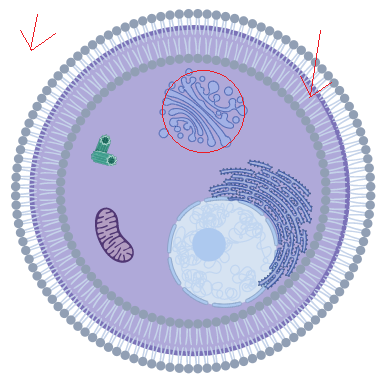 En esta imagen se puede observar el compartimento celular o orgánulo en el que se encuentra la proteína MT5-MMP dentro de la célula.